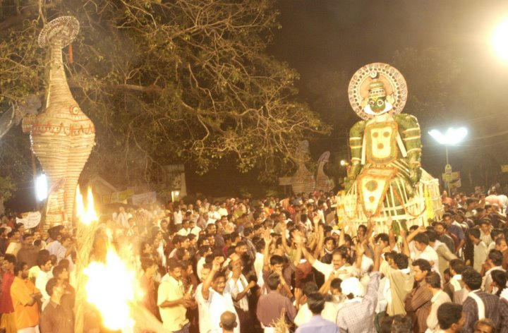 Padayani